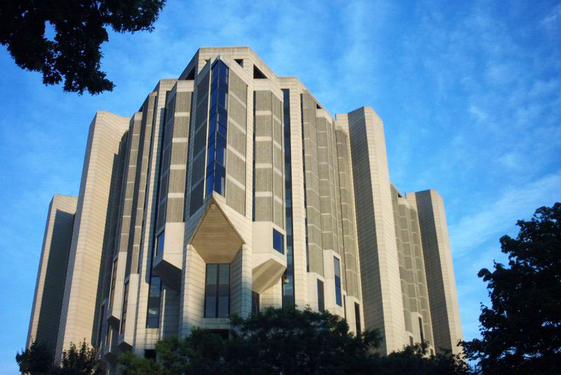 Robarts Library